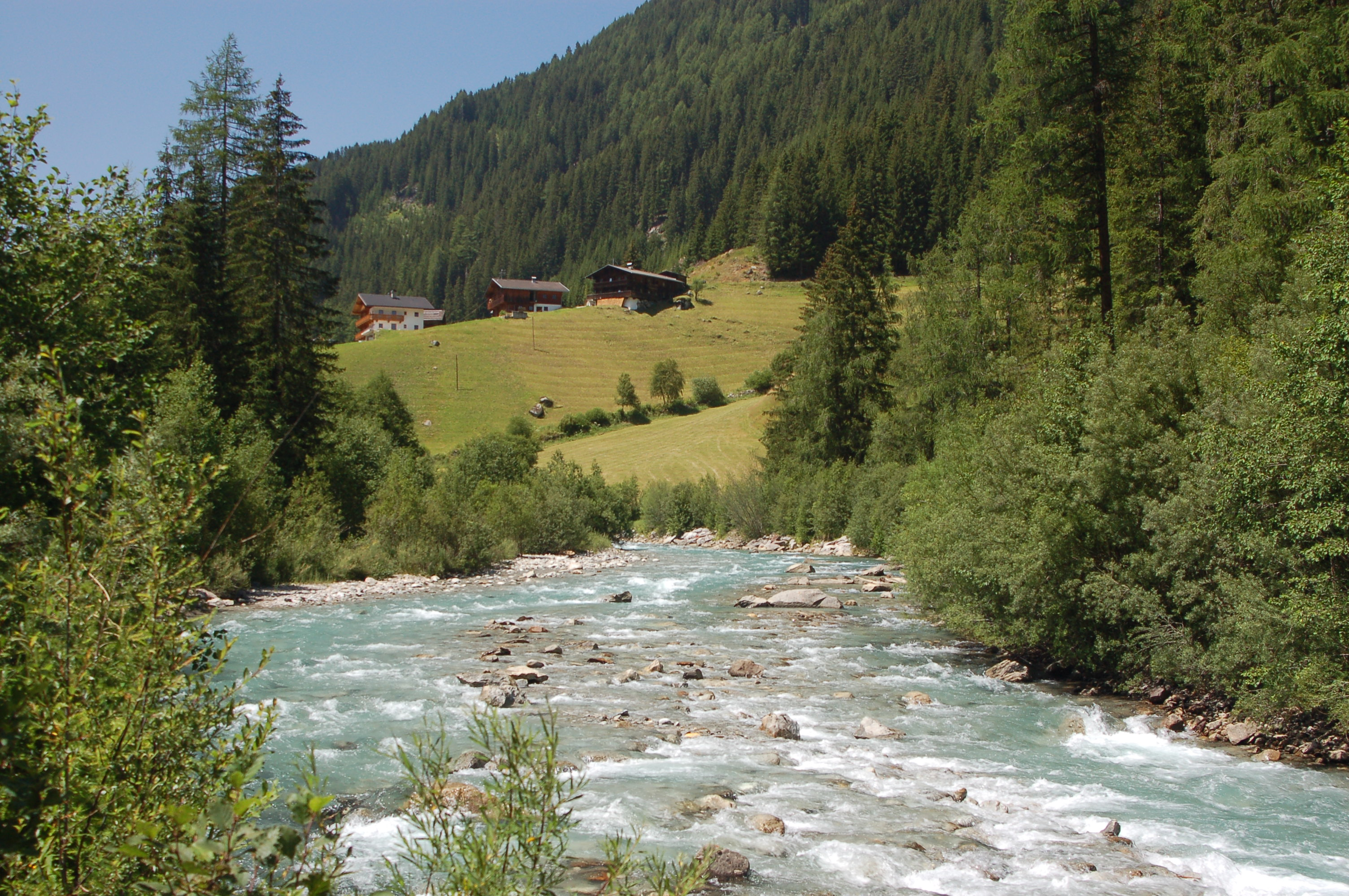 Die Schwarzach in Sankt Jakob in Defereggen, Blick auf die Oberrotte